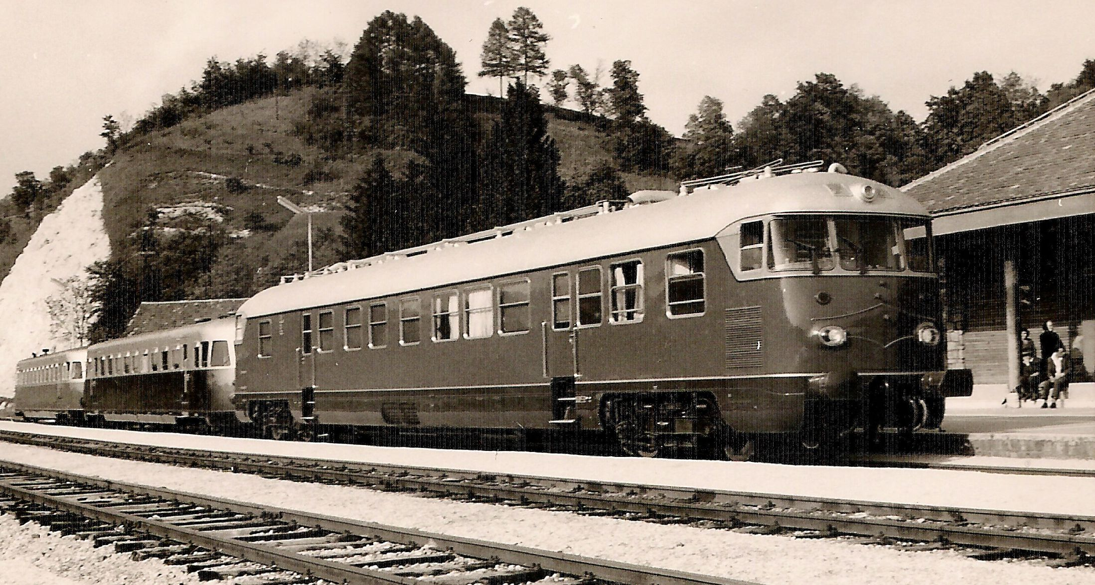 Salontriebwagen MOT 410 für Marschall Tito zusammen mit zwei älteren Breda-Salonwagen im Mai 1961 in Kumrovec/Kroatien